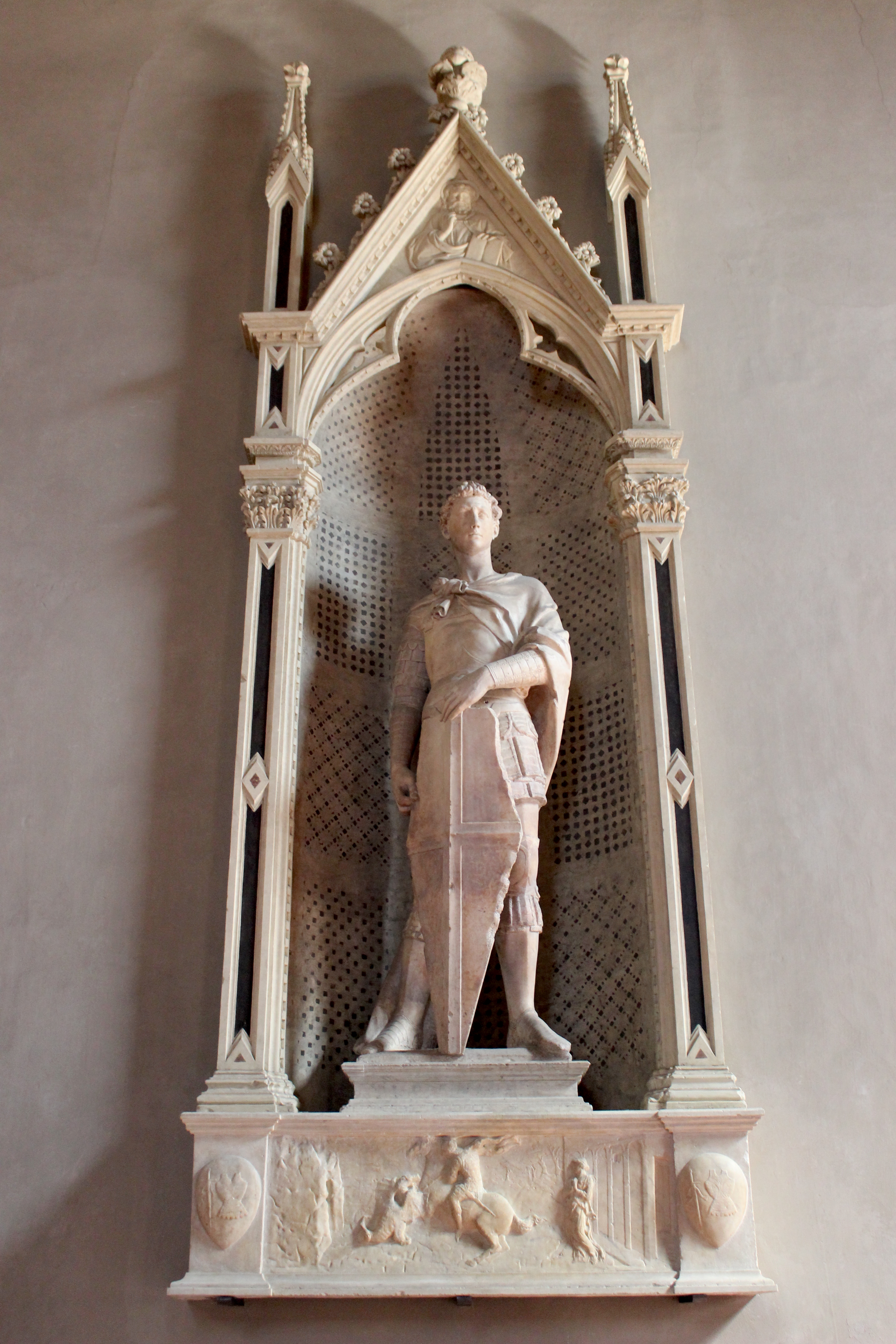 Museo del Bargello. San Jorge, por Donatello.